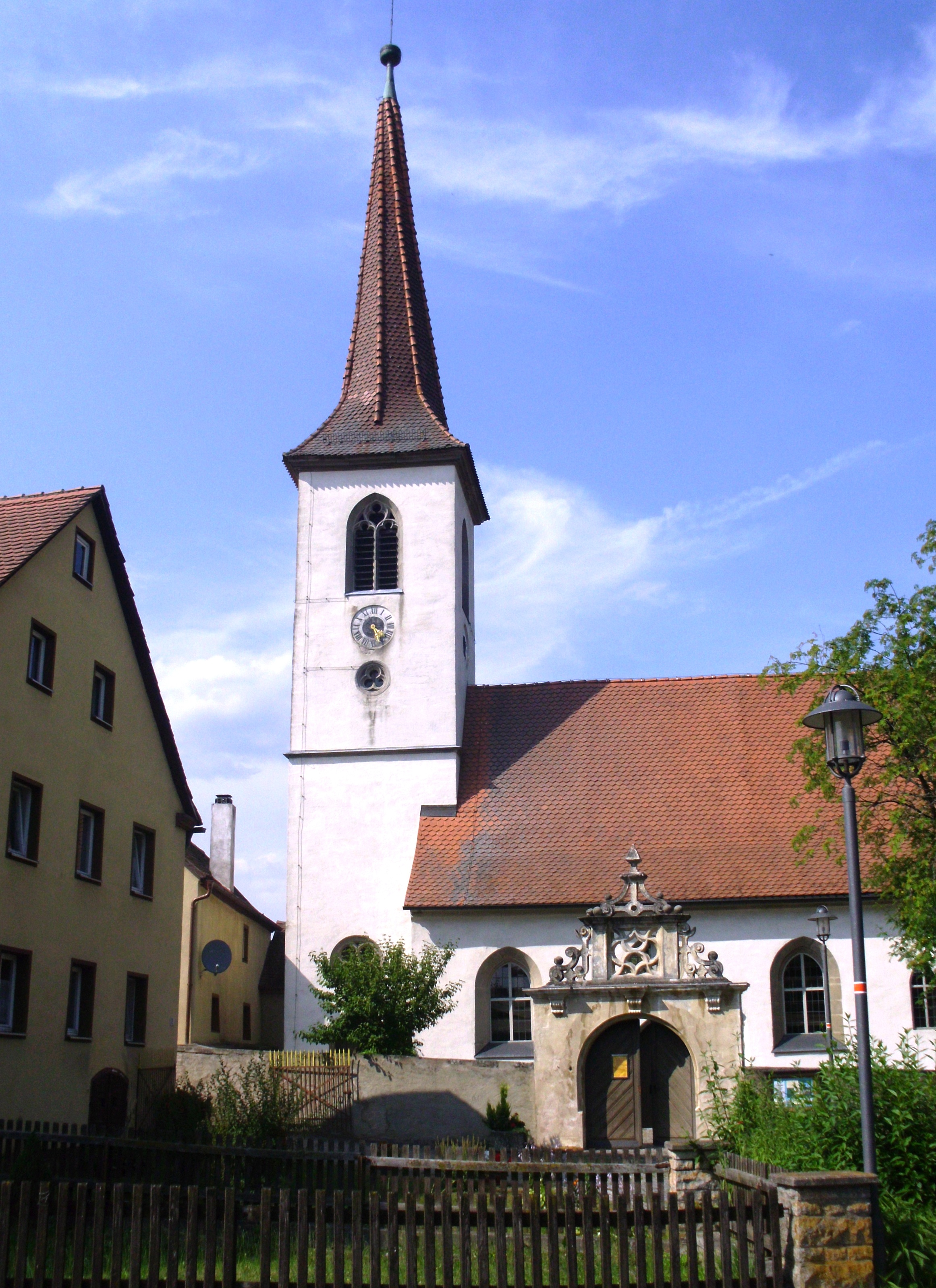 Jochsberg, Ortsteil von Leutershausen im Landkreis Ansbach, Kirche St. Mauritius